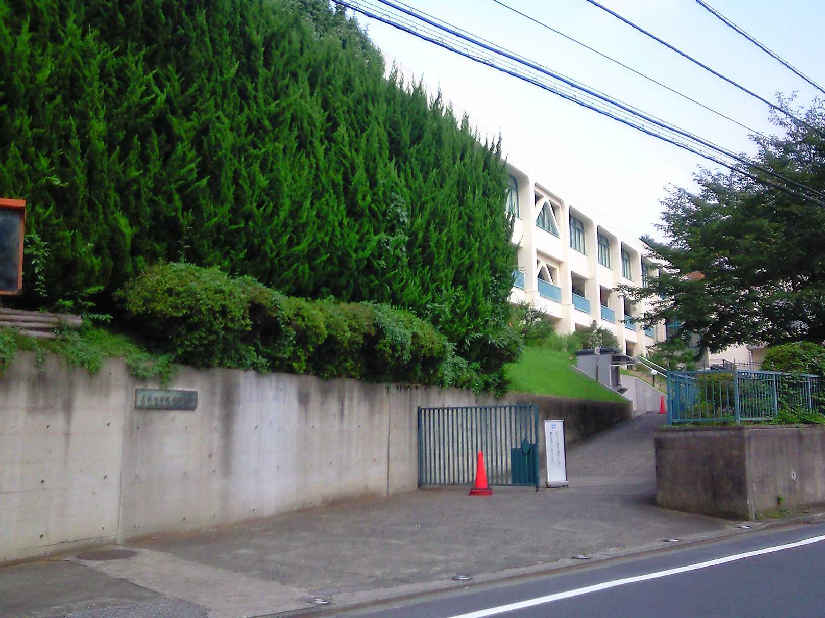 立教女学院短期大学（2008年9月6日投稿者が撮影）